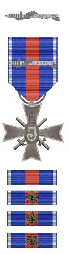 Kruis voor Recht en Vrijheid (Dienst in Korea 1950-)